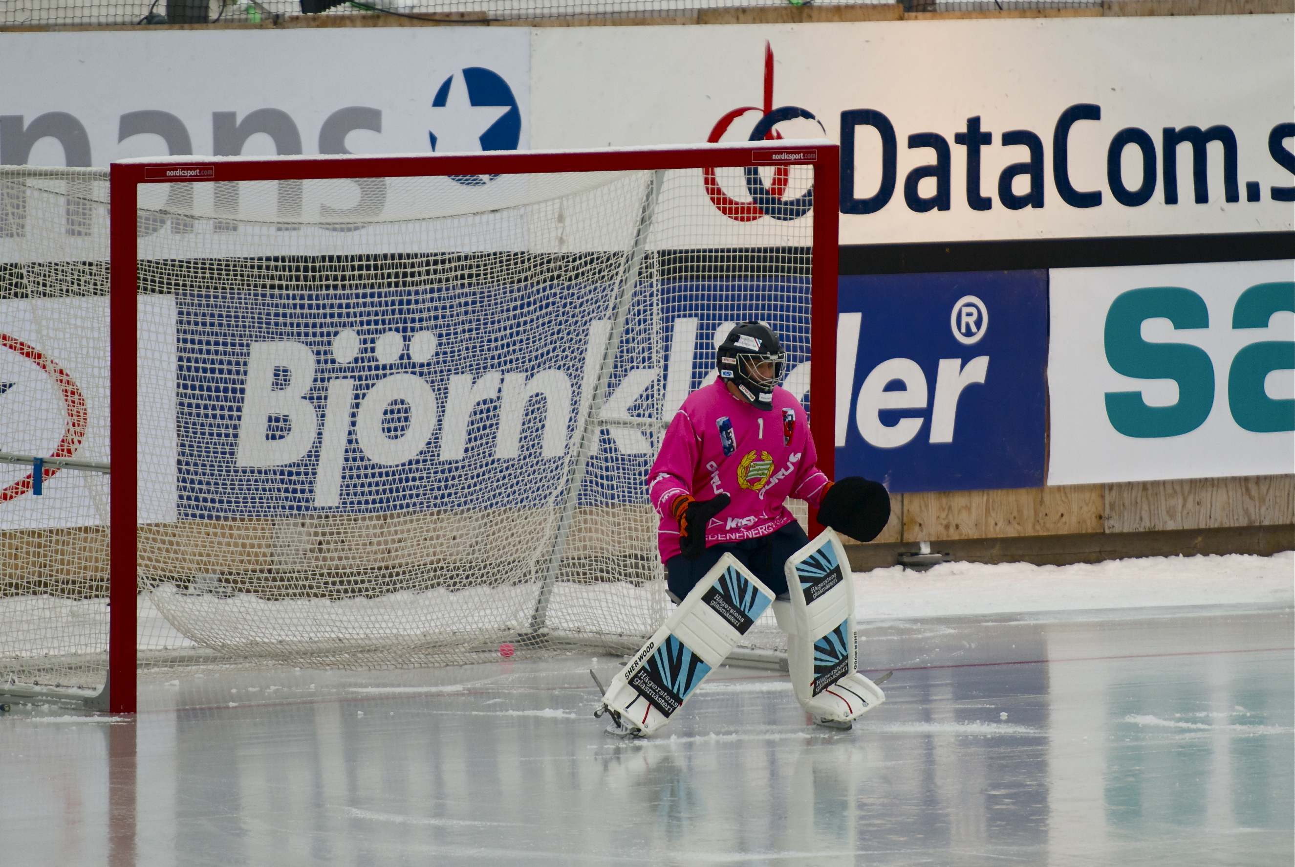 Emil Paulin Ström, Hammarby Bandy. Bandy match between Hammarby (Green) and GAIS (White) in Elitserien, Zinkendamms IP (Stockholm) 2012-02-11.